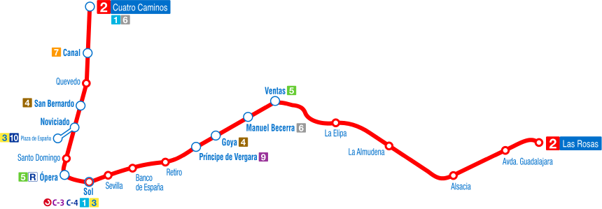 Recorrido de la linea 2 del Metro de Madrid